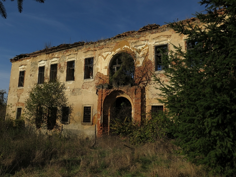 Zámek Líšťany, Líšťany 1, Líšťany (okres Plzeň-sever).